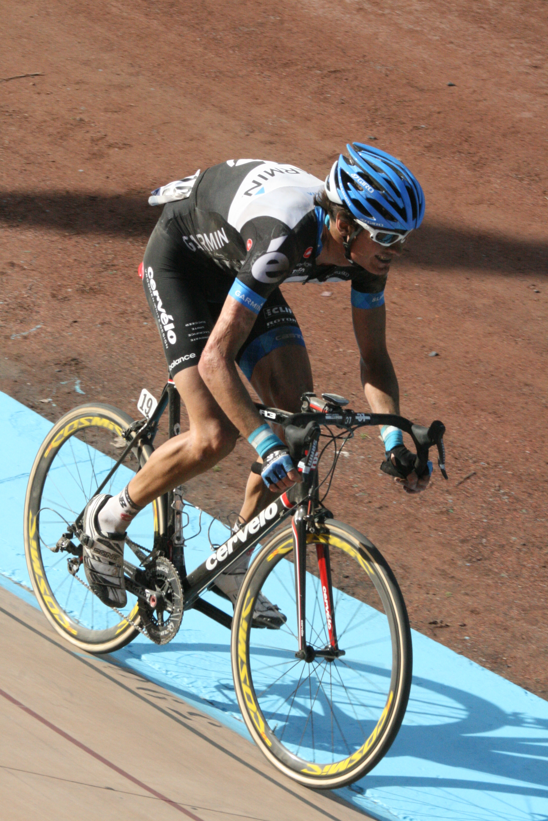 Arrivée de Paris-Roubaix 2011 au vélodrome de Roubaix Johan Vansummeren